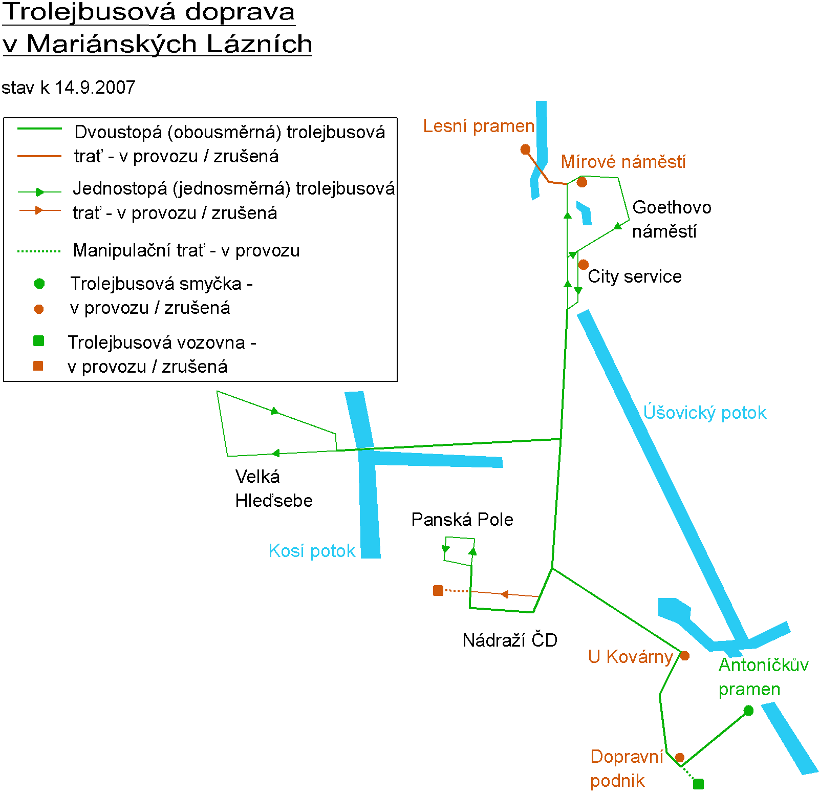 Zjednodušené schéma trolejbusové dopravy v Mariánských Lázních, stav k 14.9.2007